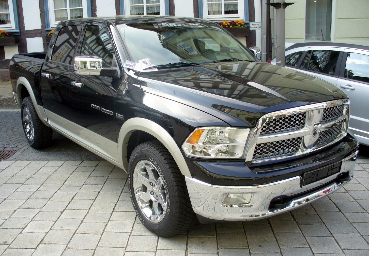 Dodge Ram 2500 (Mexico Version - in den USA: RAM 1500)